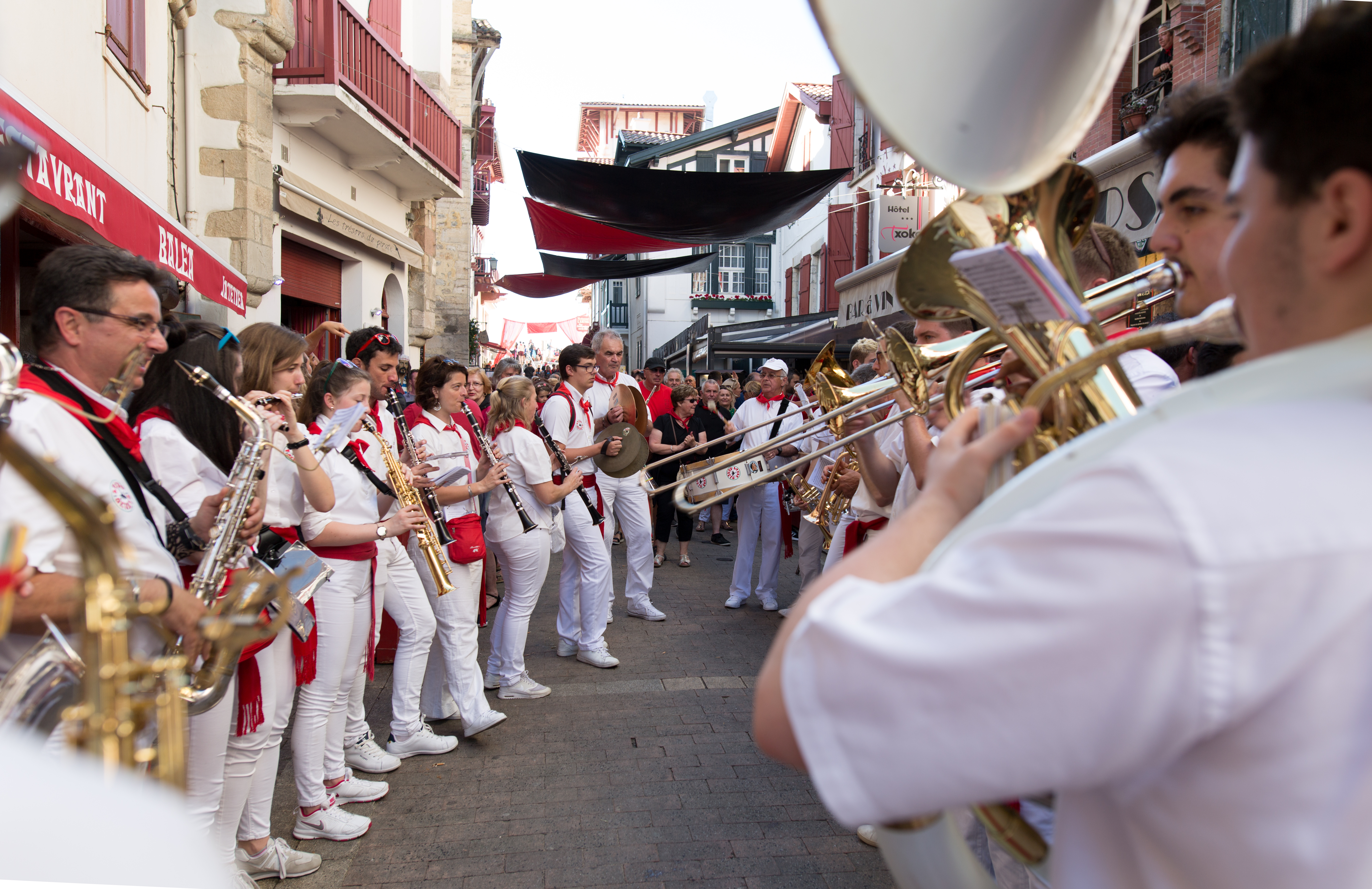 Banda